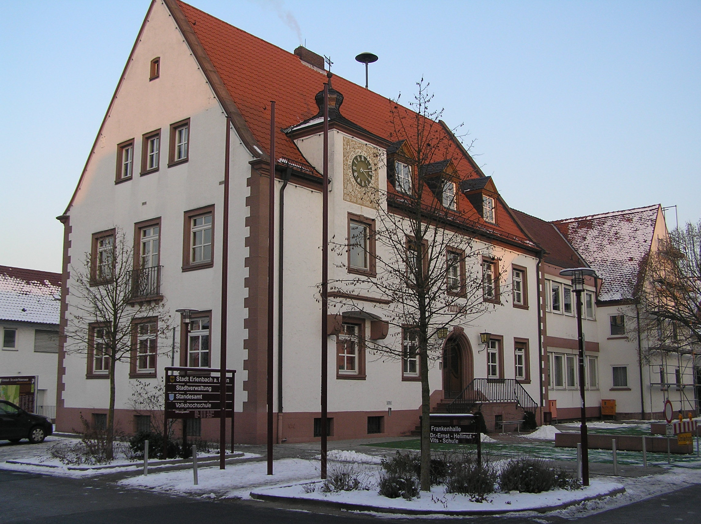 Das Rathaus von Erlenbach am Main im Winter